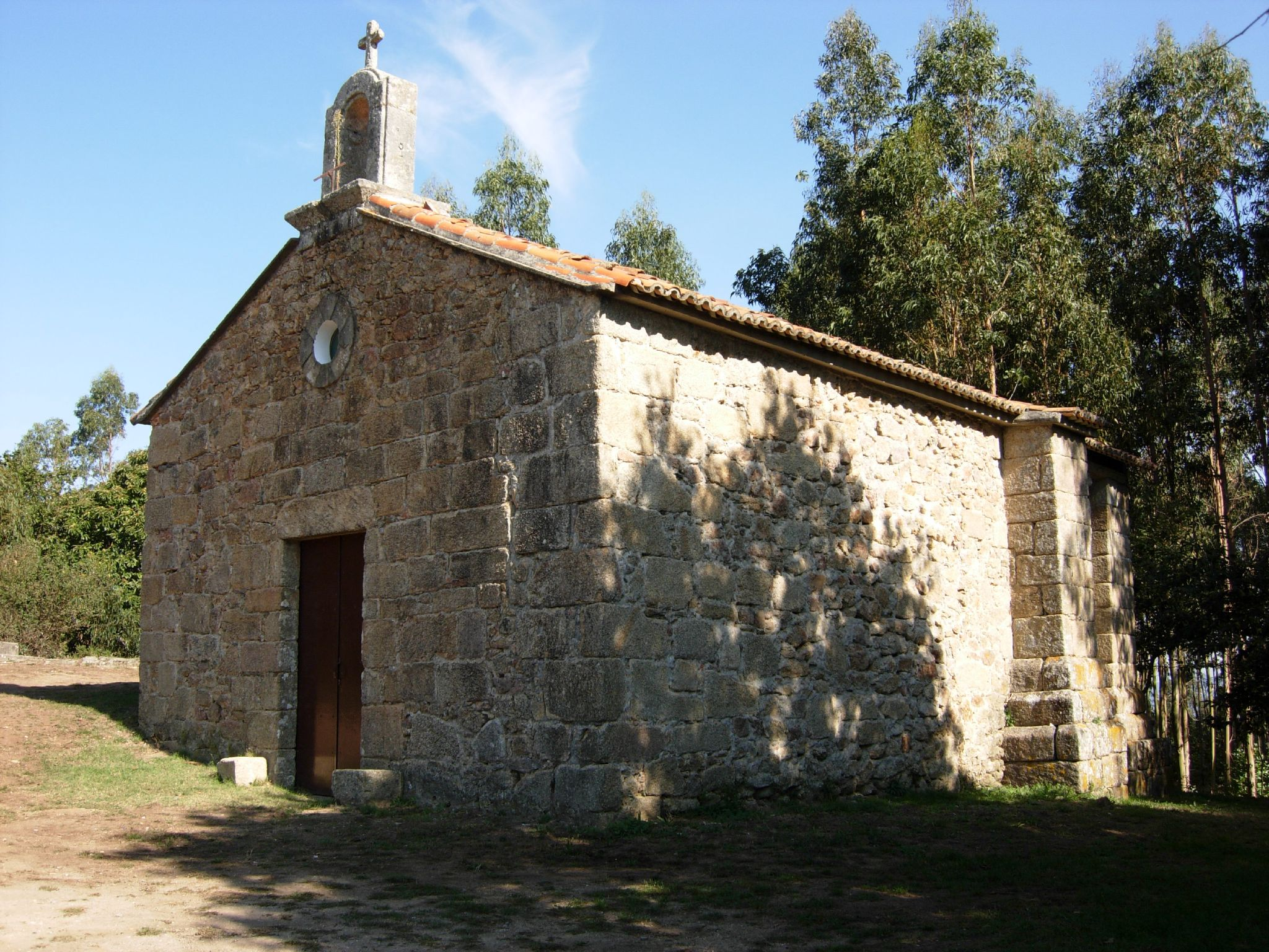 Capela de San Cosme de Sesamo - Culleredo - A CoruñaCapilla de San Cosme de Sesamo